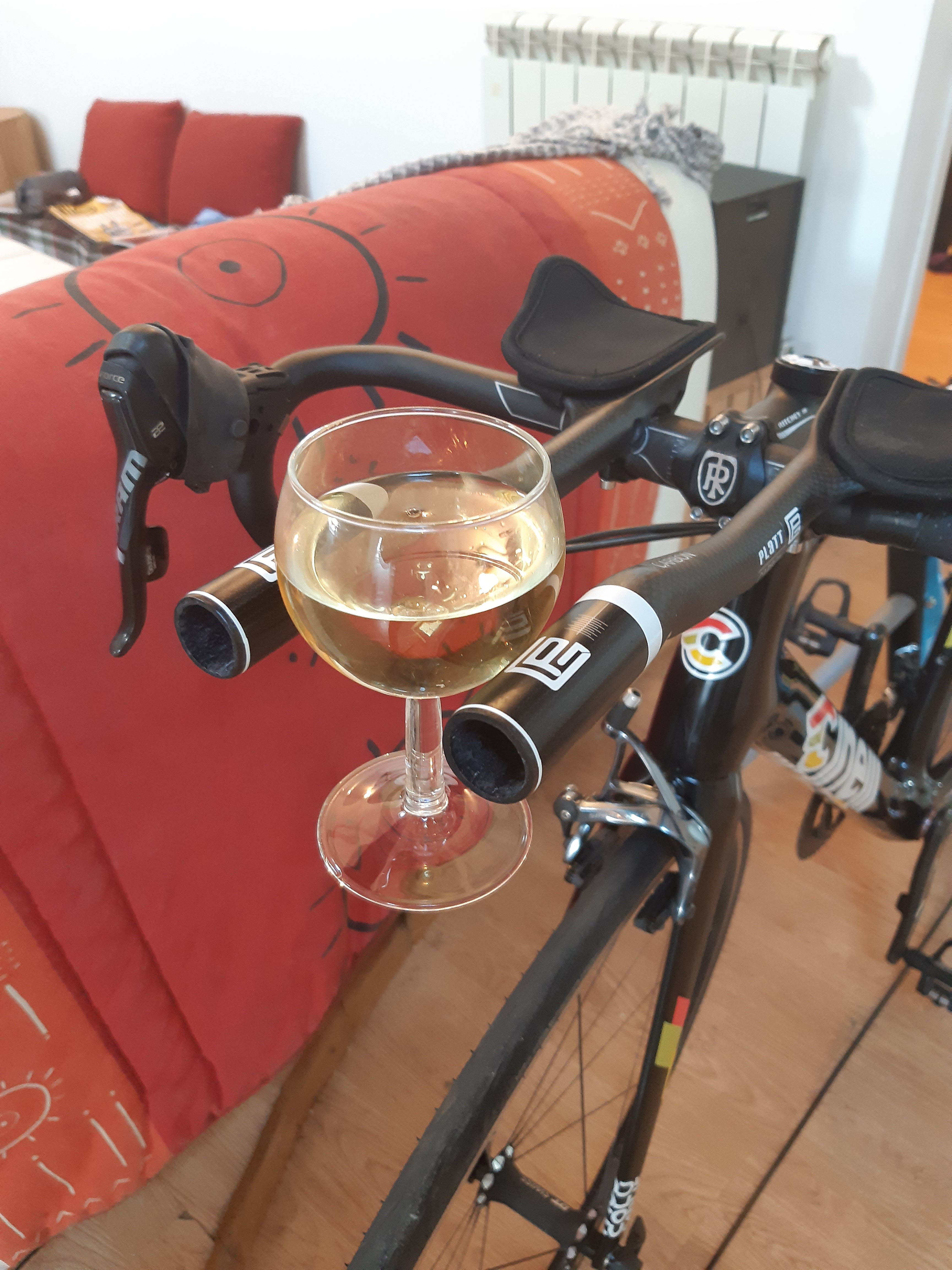 Prolongateurs sur guidon et verre de vin